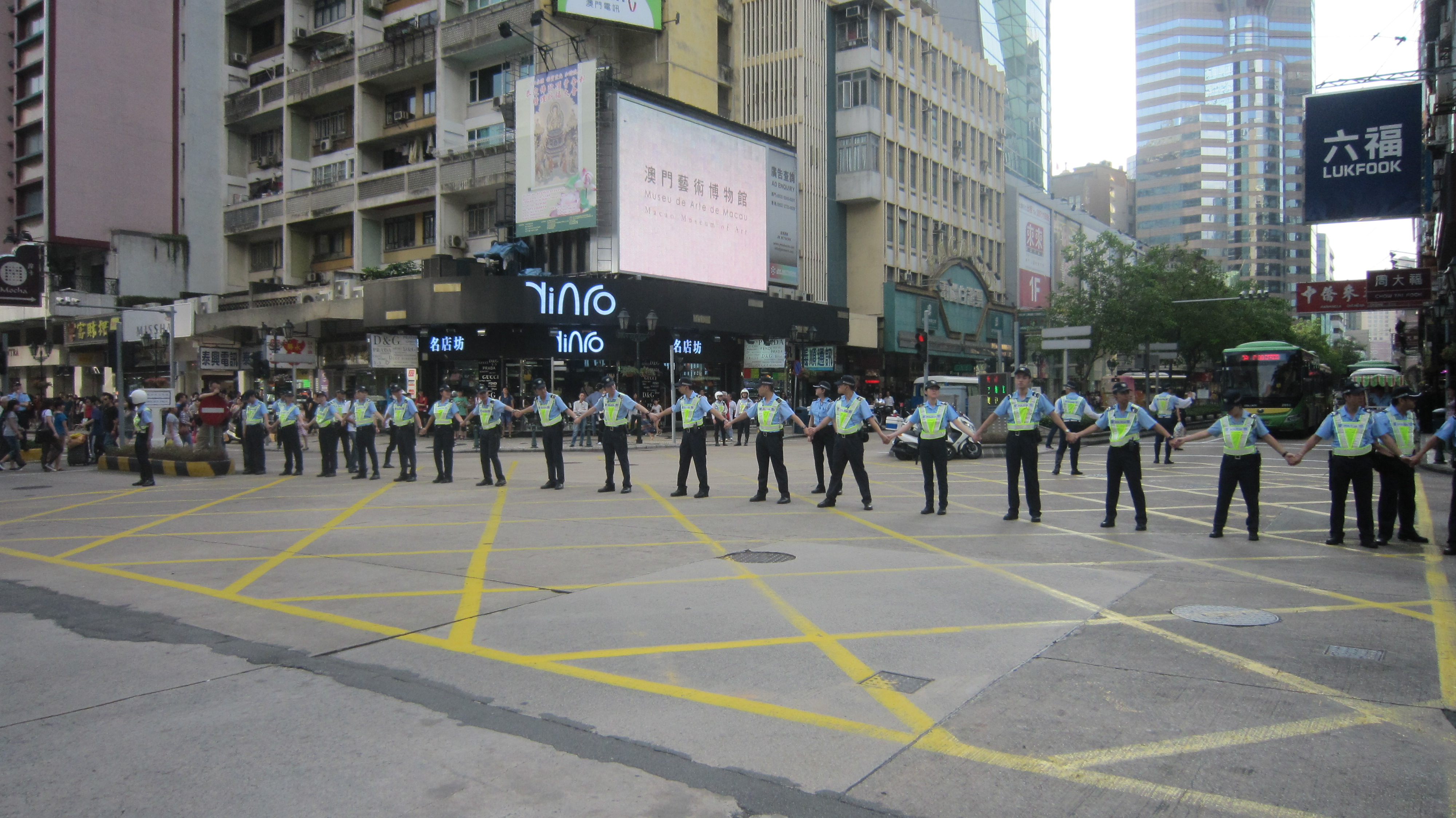 Procissão em 1 de Maio de 2012 em Macau